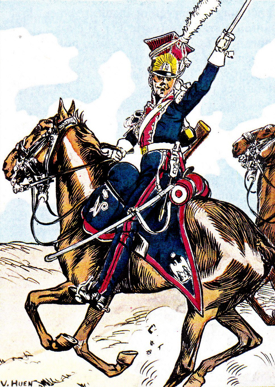 Chevau-léger polonais de la Garde impériale en tenue de service (1807-1808).